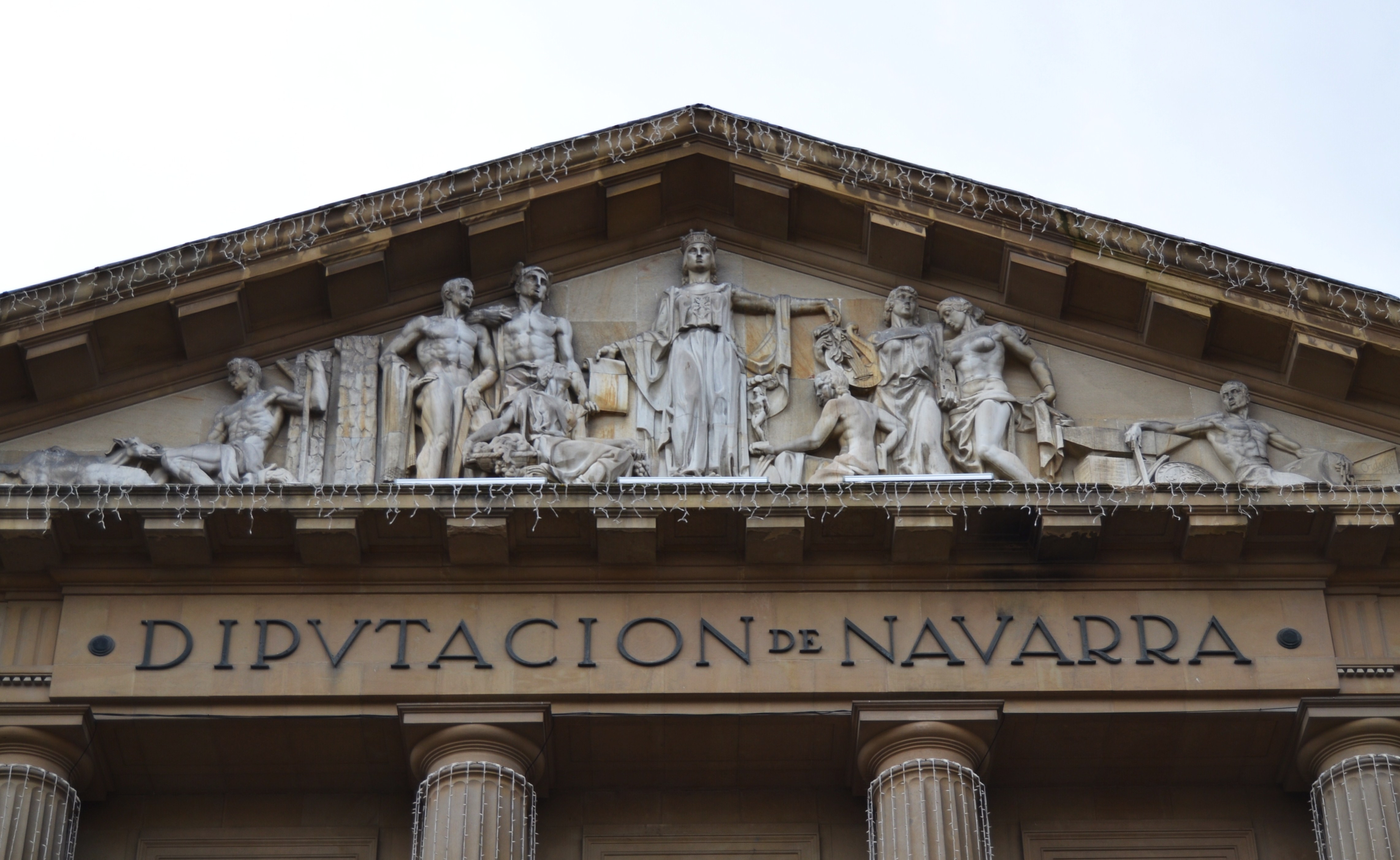 Frontó del palau de Navarra, Pamplona.